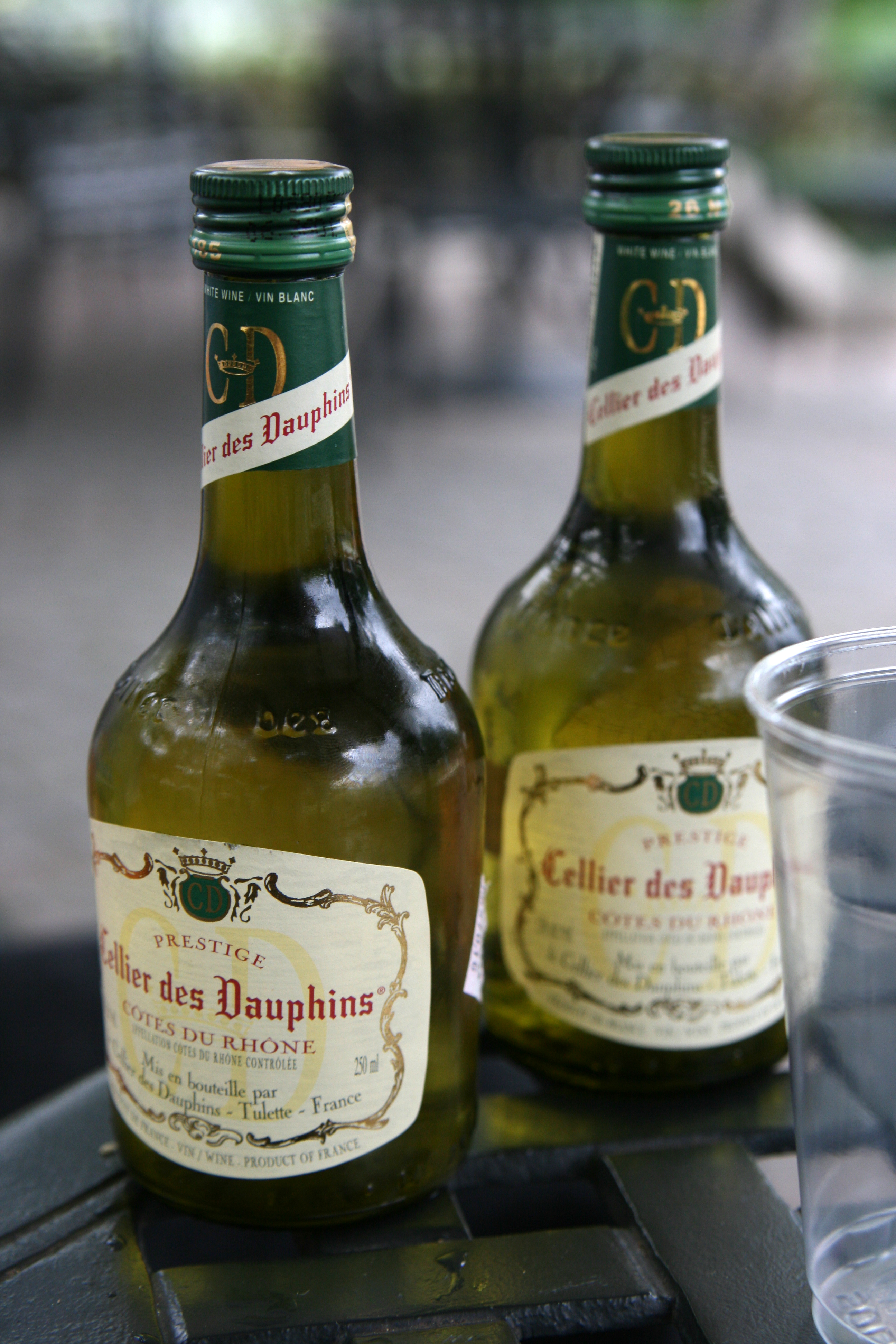 Cuvée Prestige du Cellier des Dauphins